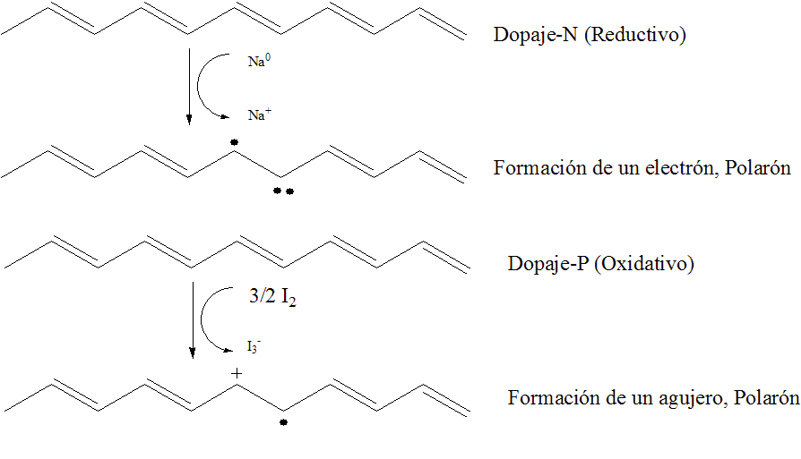 Resumen de reacciones en el dopaje de polímeros